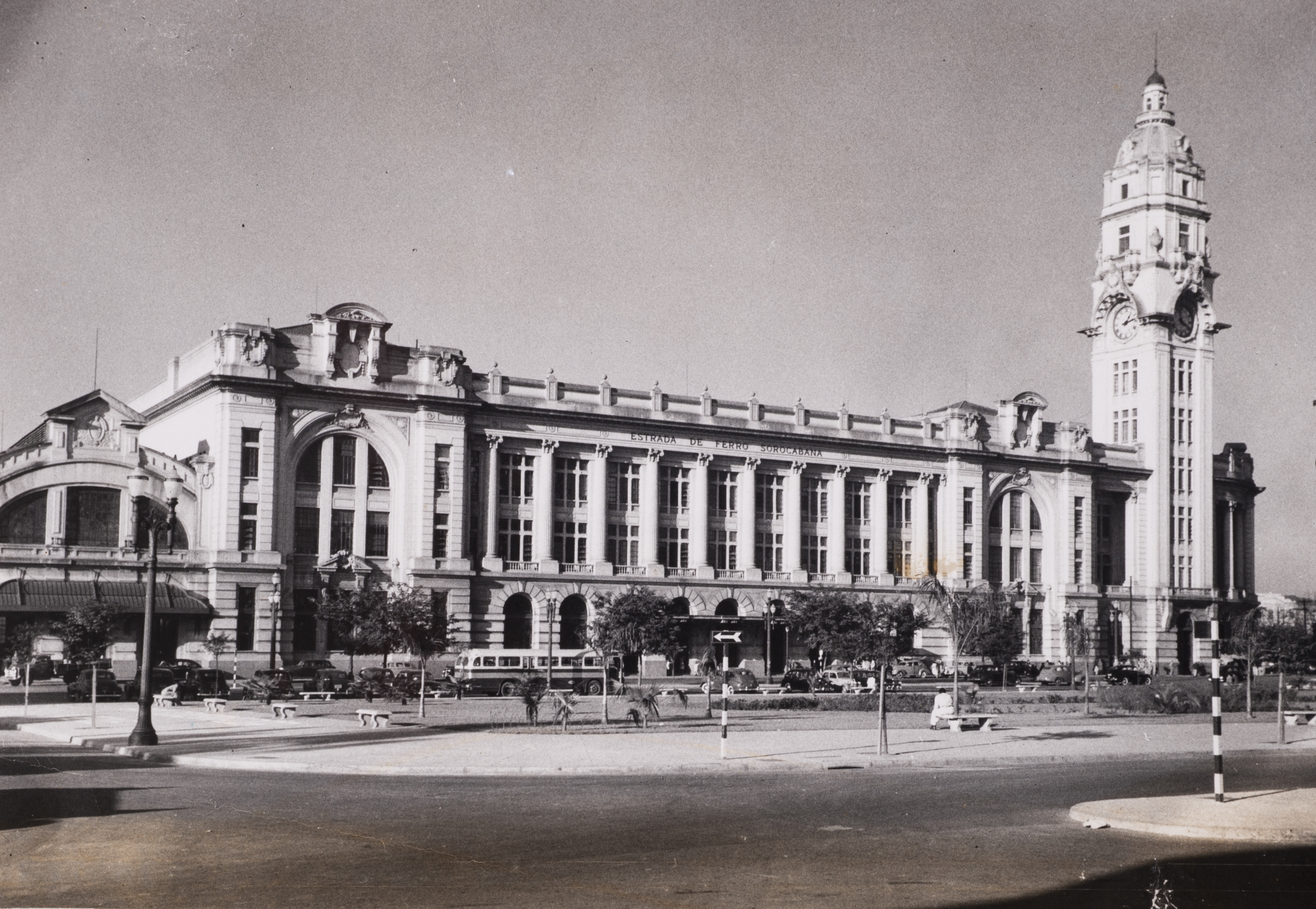 Obra que integra o acervo do Museu Paulista da USP. Coleção Werner Haberkorn - CHW